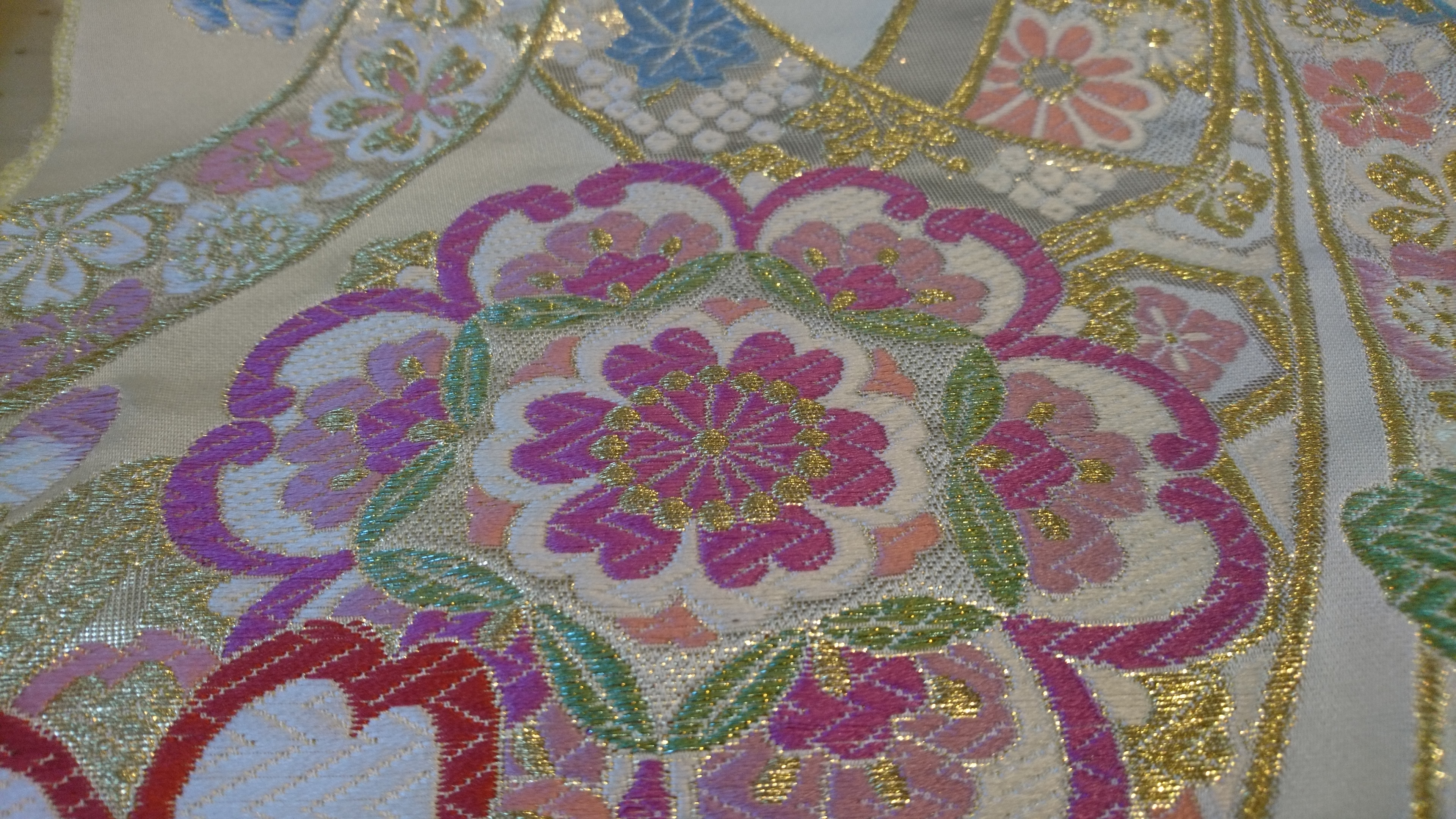 丹後ちりめんの先染め織物。生糸を精練・染色してから織り上げる。